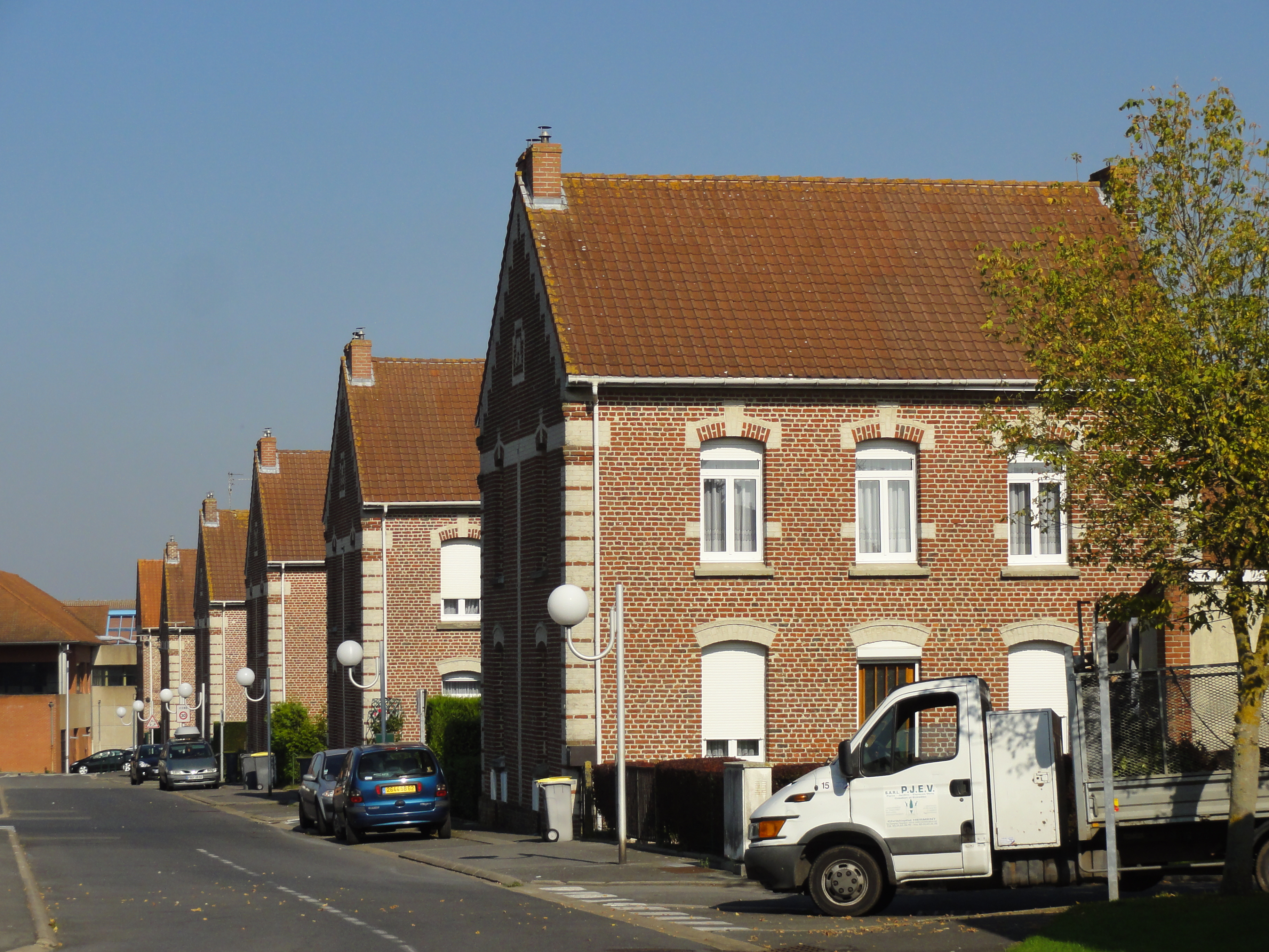 Cités de la Fosse n° 4 - 4 bis - 4 ter de la Compagnie des mines de Bruay, Bruay-la-Buissière, Pas-de-Calais, Nord-Pas-de-Calais, France.